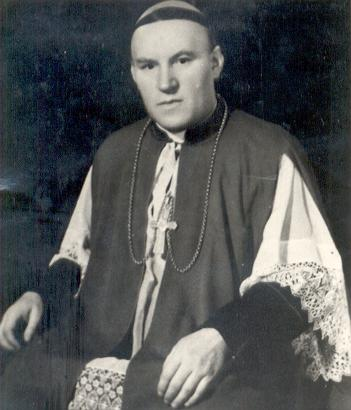 J. E. Ks. Bp Dr Jan Objąk